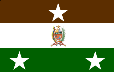 Bandera del municipio Motatán del estado Trujillo, Venezuela